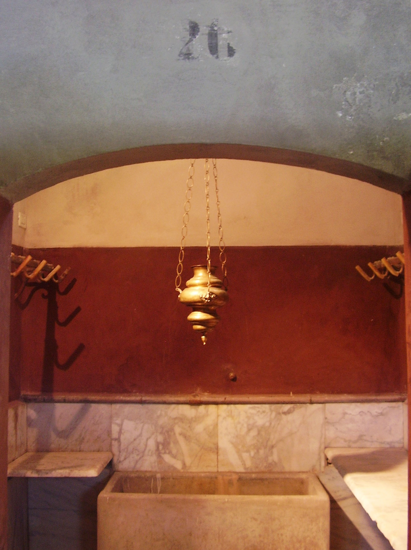 pendolo galileiano